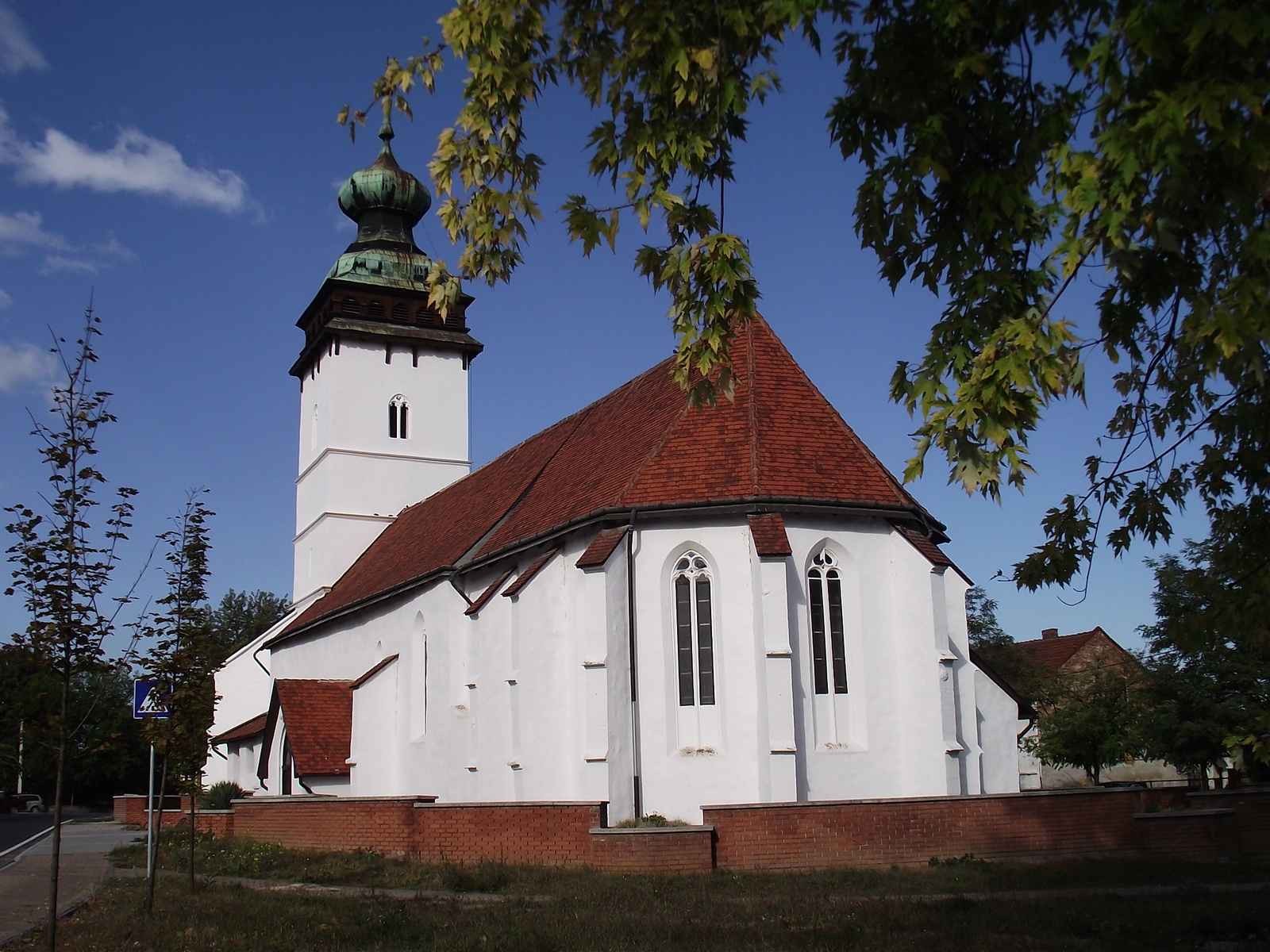 Ref.templom (Sajószentpéter, Béke tér 13.) This is a photo of a monument in Hungary. Identifier: 3075